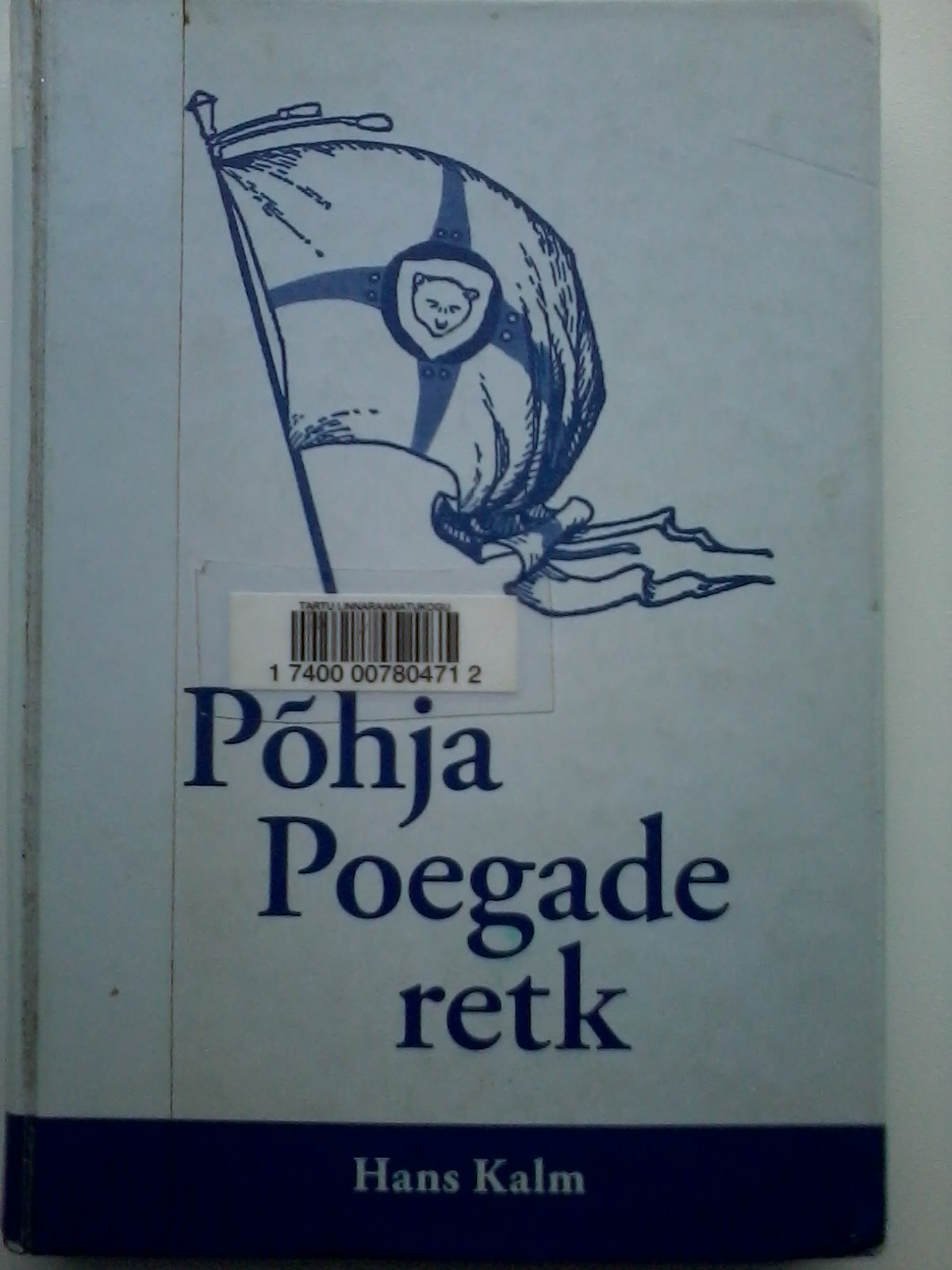 Hans Kalm, "Põhja Poegade retk" (2008)